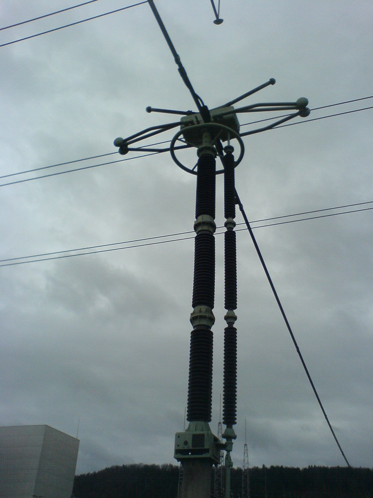 Trennschalter (380 kV) der Schaltfeld und Sammelschiene voneinander trennt